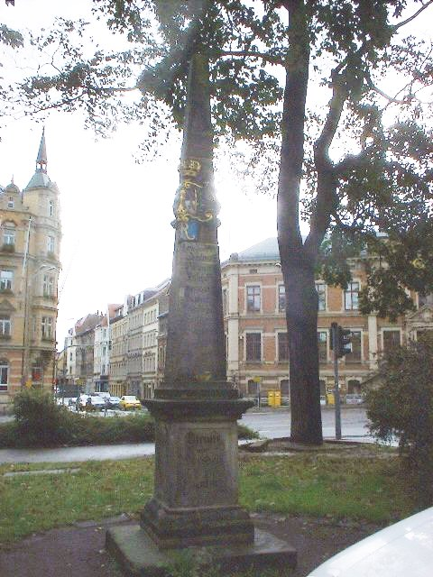 Postmeilensäule Freiberg Postplatz